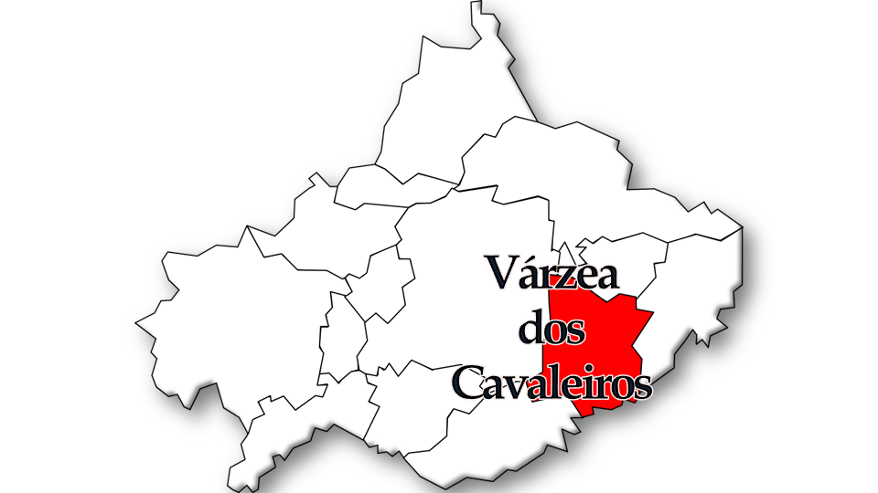 População